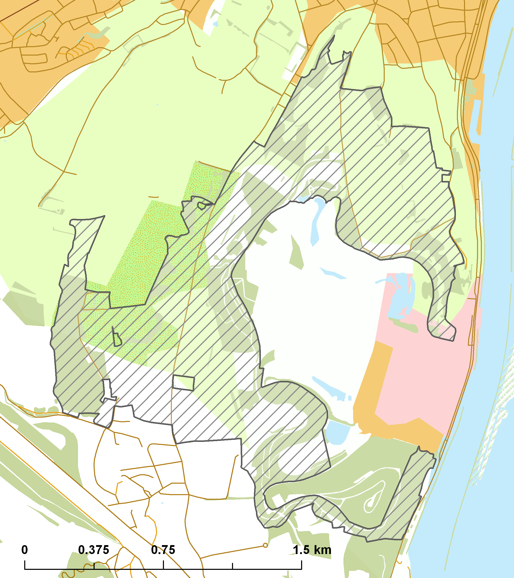 Natura2000 - Sint Pietersberg & Jekerdal.png